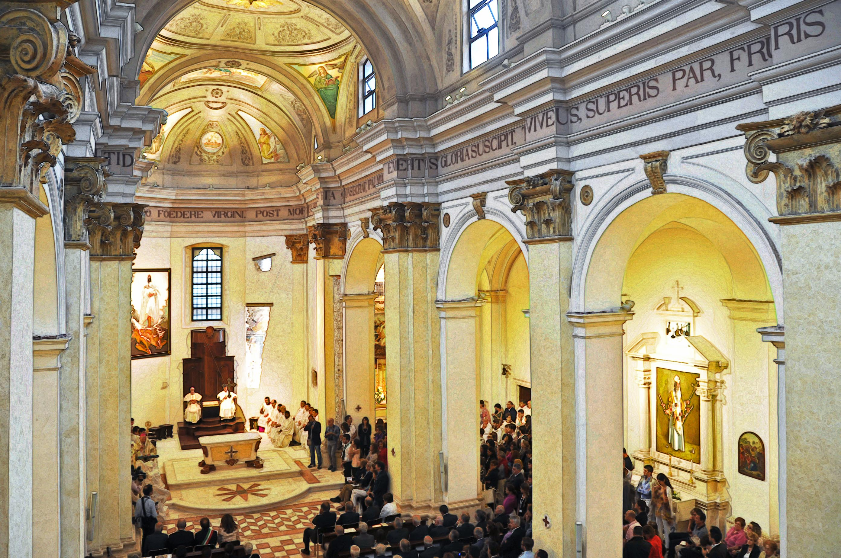 Chiesa parrocchiale di San Giuseppe Artigiano in L'Aquila